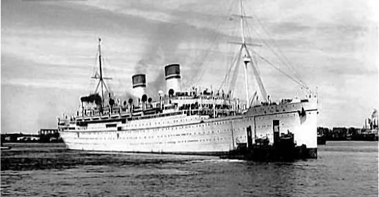 Il transatlantico Roma spinto dai rimorchiatori per l'accosto in banchina